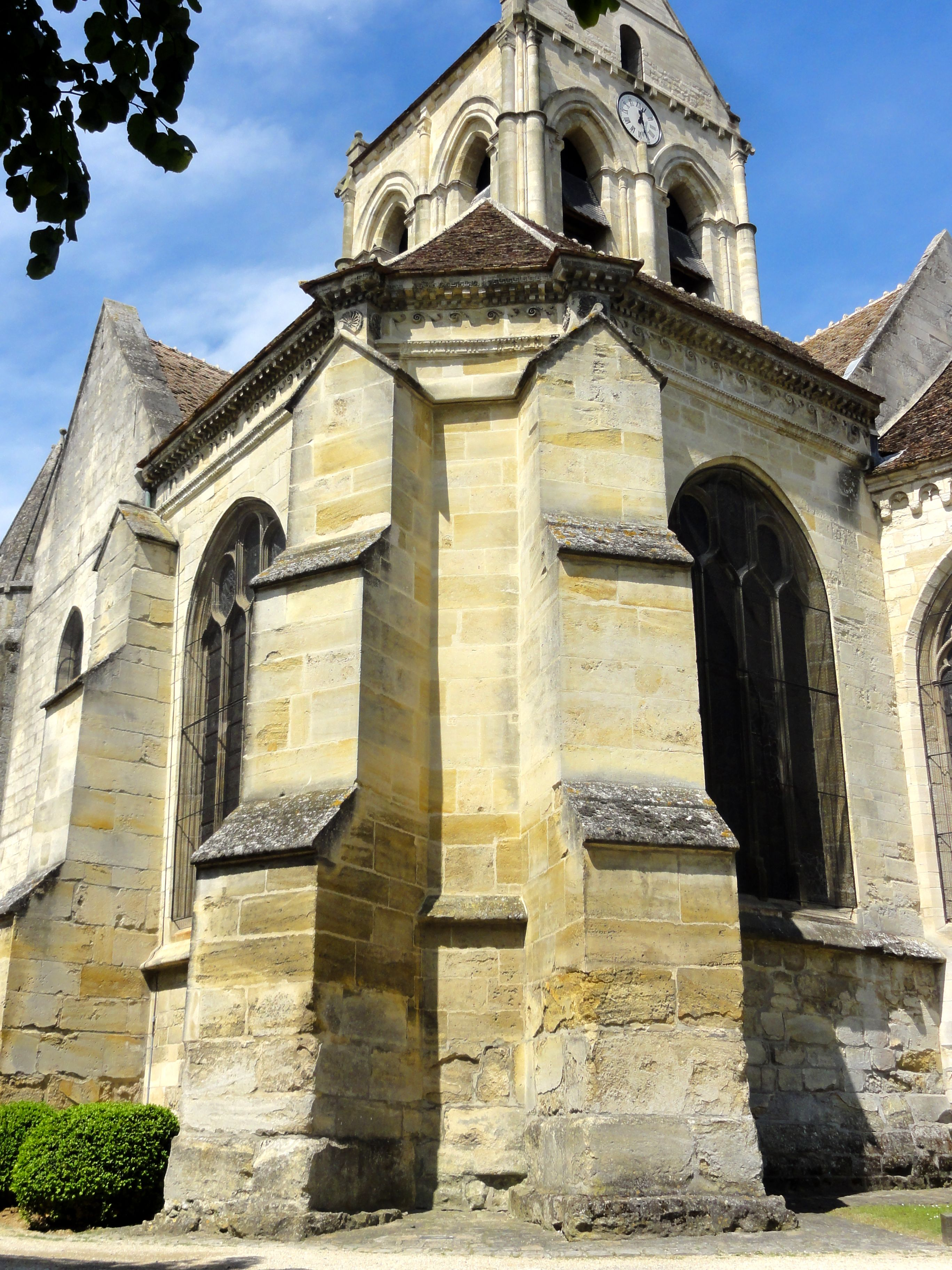 Chapelle latérale sud.